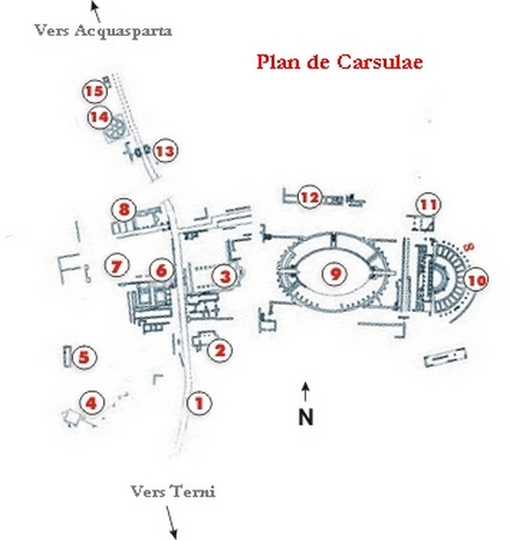 Plan de Carsulae traduit en français